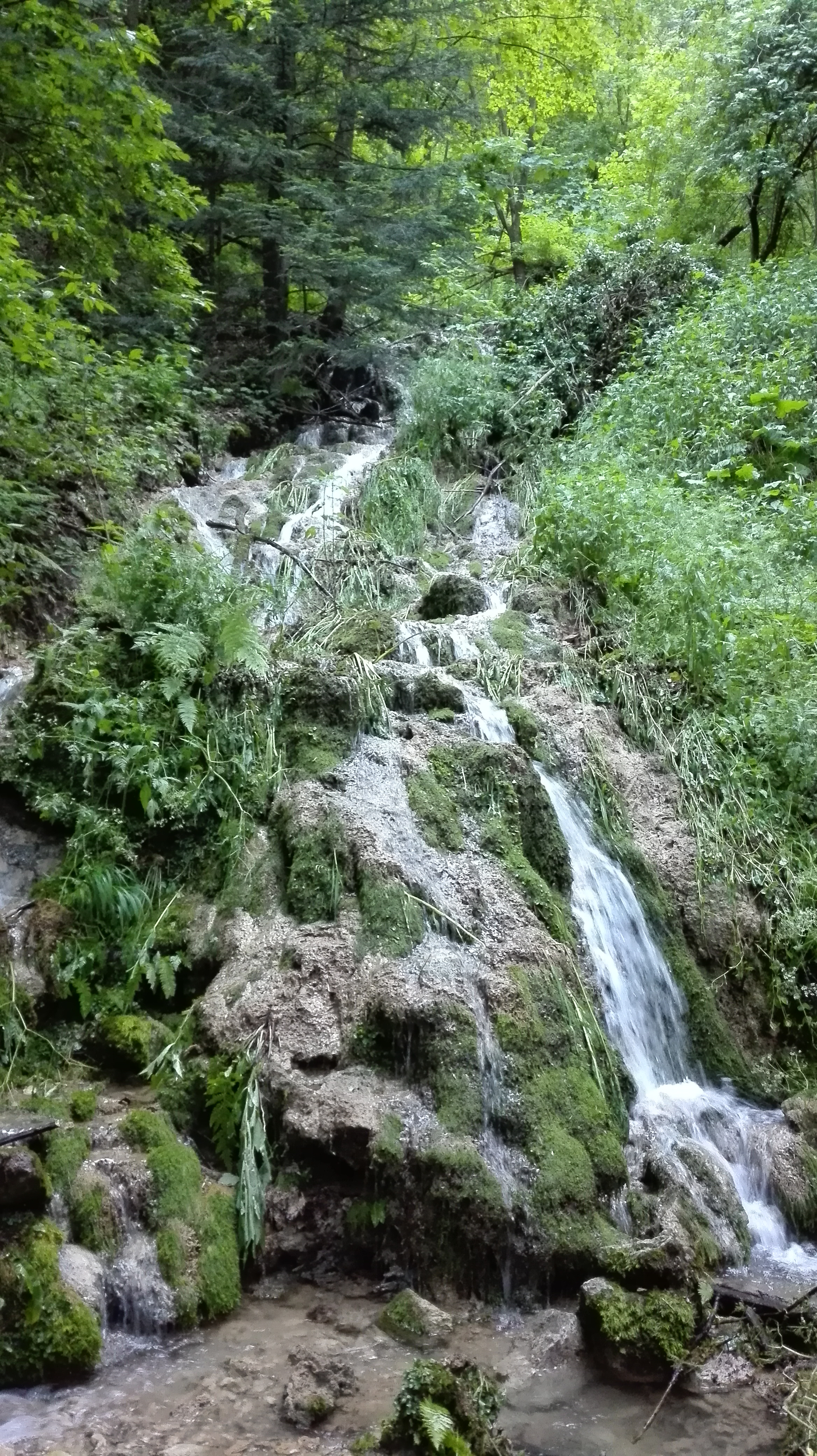 Строги природни резерват Фељешана Ово је фотографија заштићеног природног добра у Србији под шифром: РП67This is a a photo of a natural area in Serbia with ID: РП67